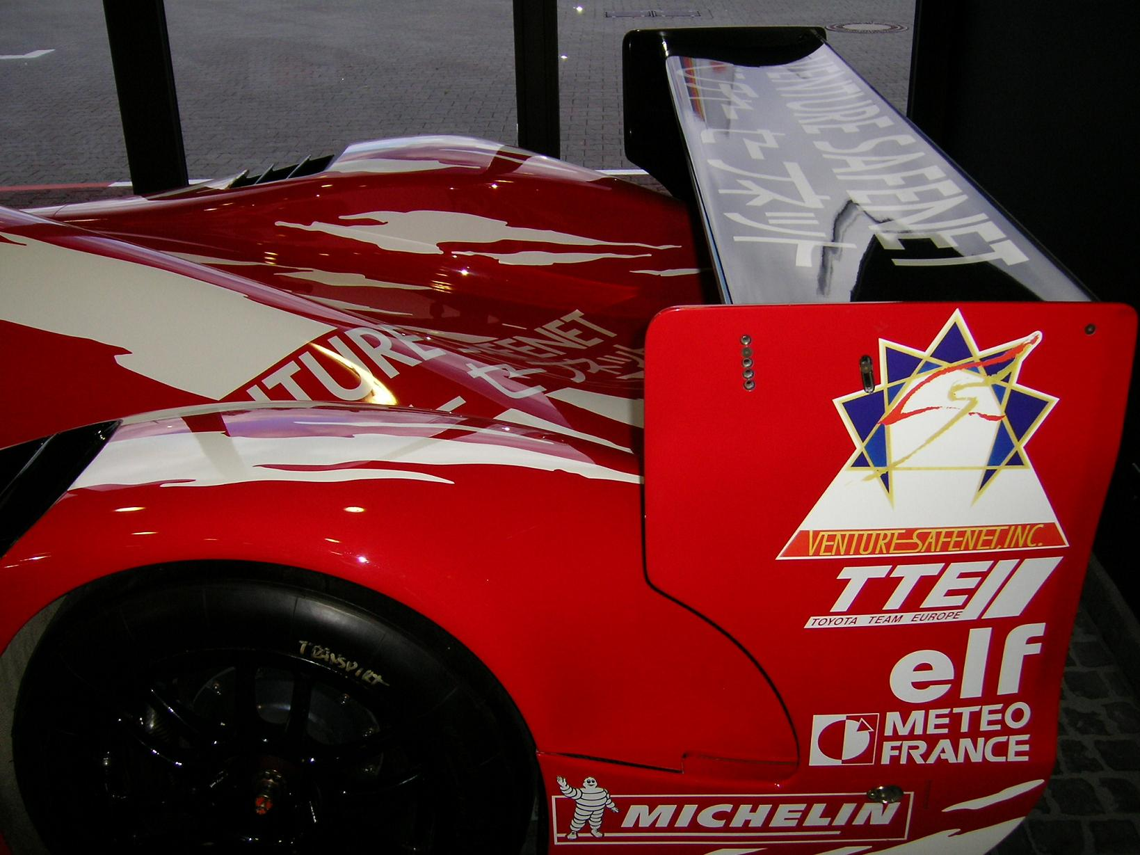 Heckspoiler eines Toyota GT-ONE